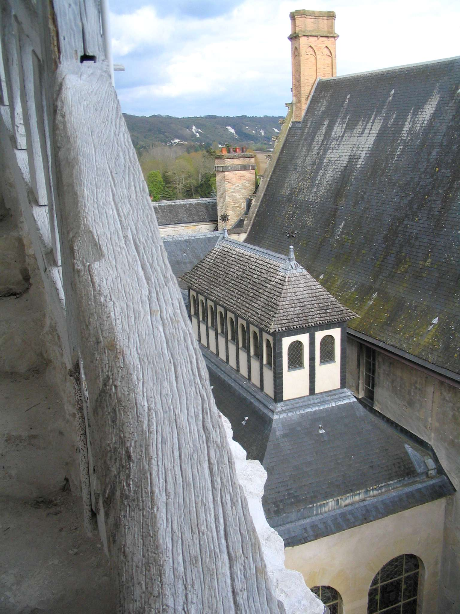 Château de La Roche Guyon, toitures du grand escalier.